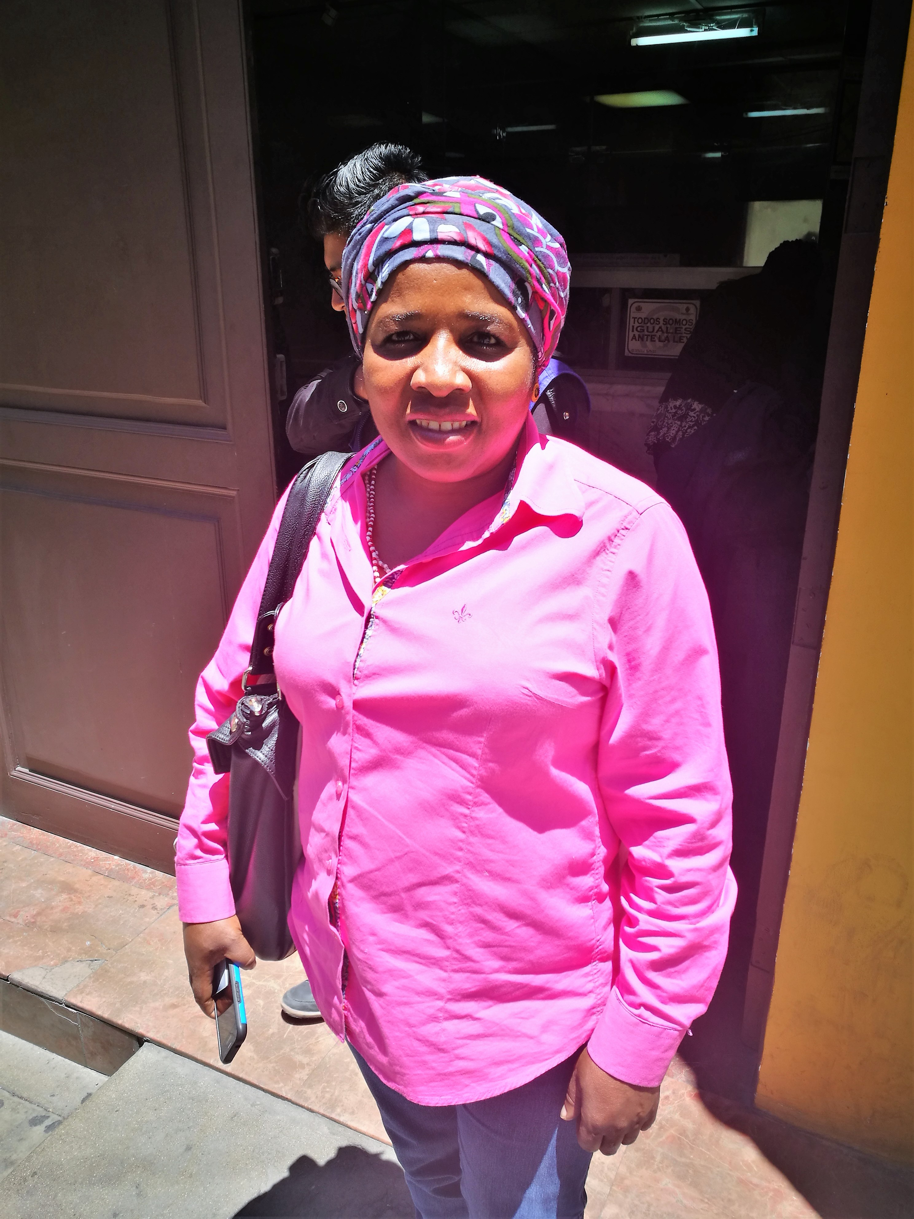 Monica Rey Gutierrez a la Paz el febrer de 2017